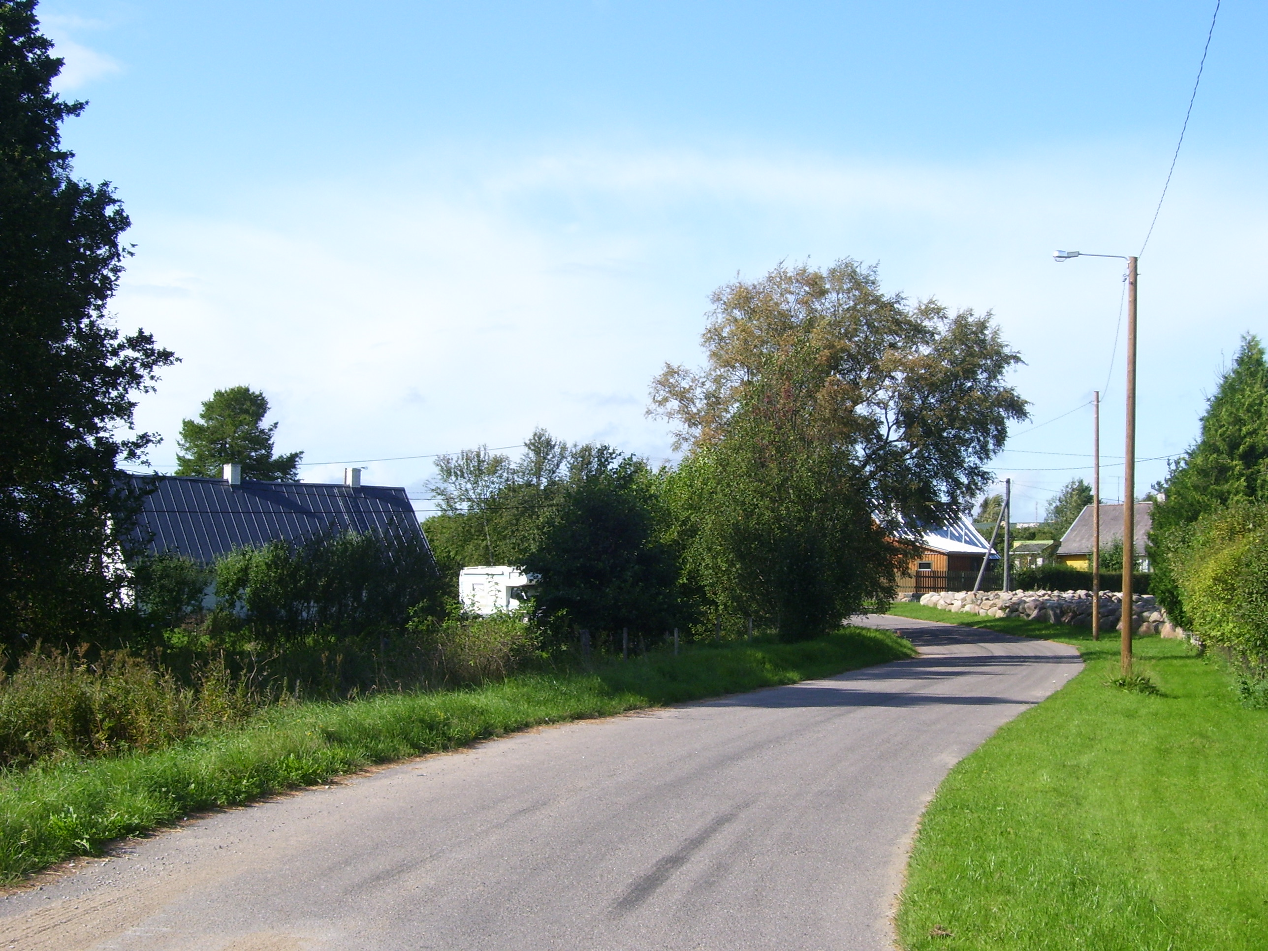 Kolga-Aabla (Kuusalu vald), küla tee.